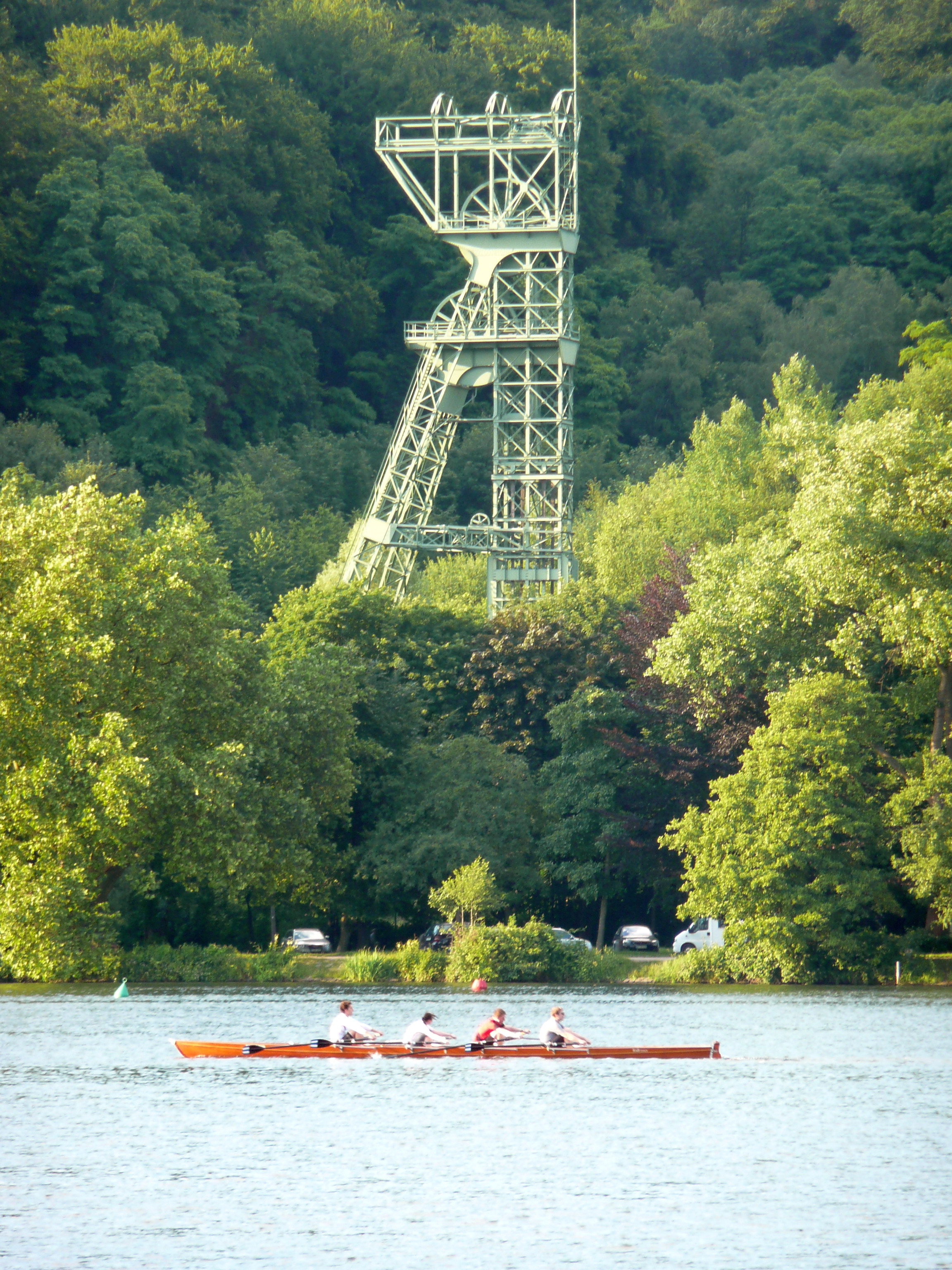 Ruderer auf dem Baldeneysee vor dem Förderturm der stillgelegten Zeche Carl-Funke